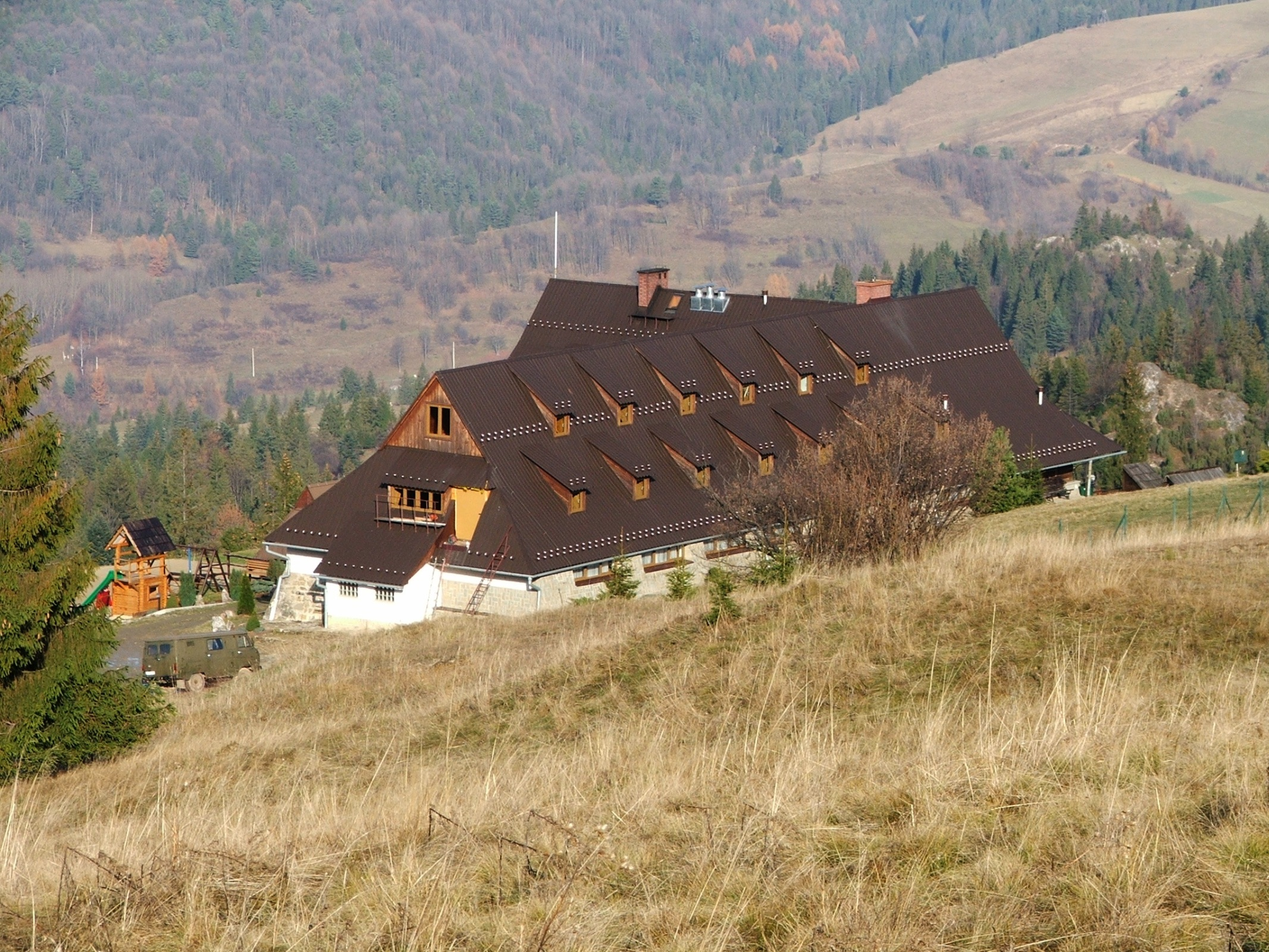 Schronisko pod Durbaszką w Małych Pieninach